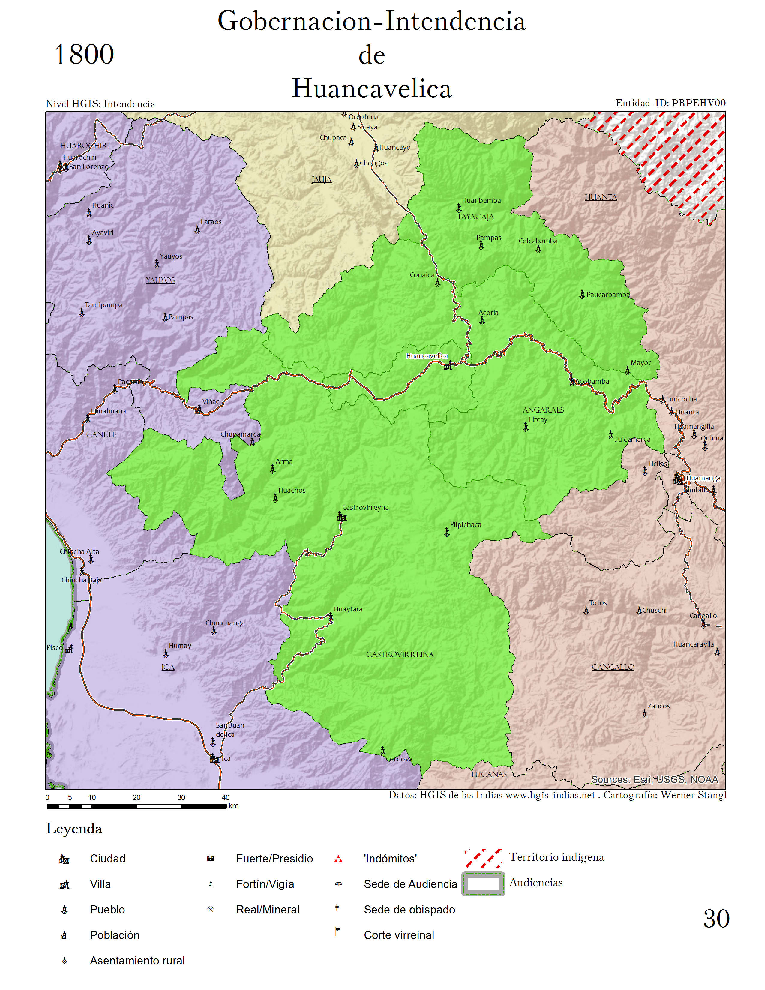 La intendencia de Huancavelica y sus divisiones (subdelegaciones) hacia 1800.